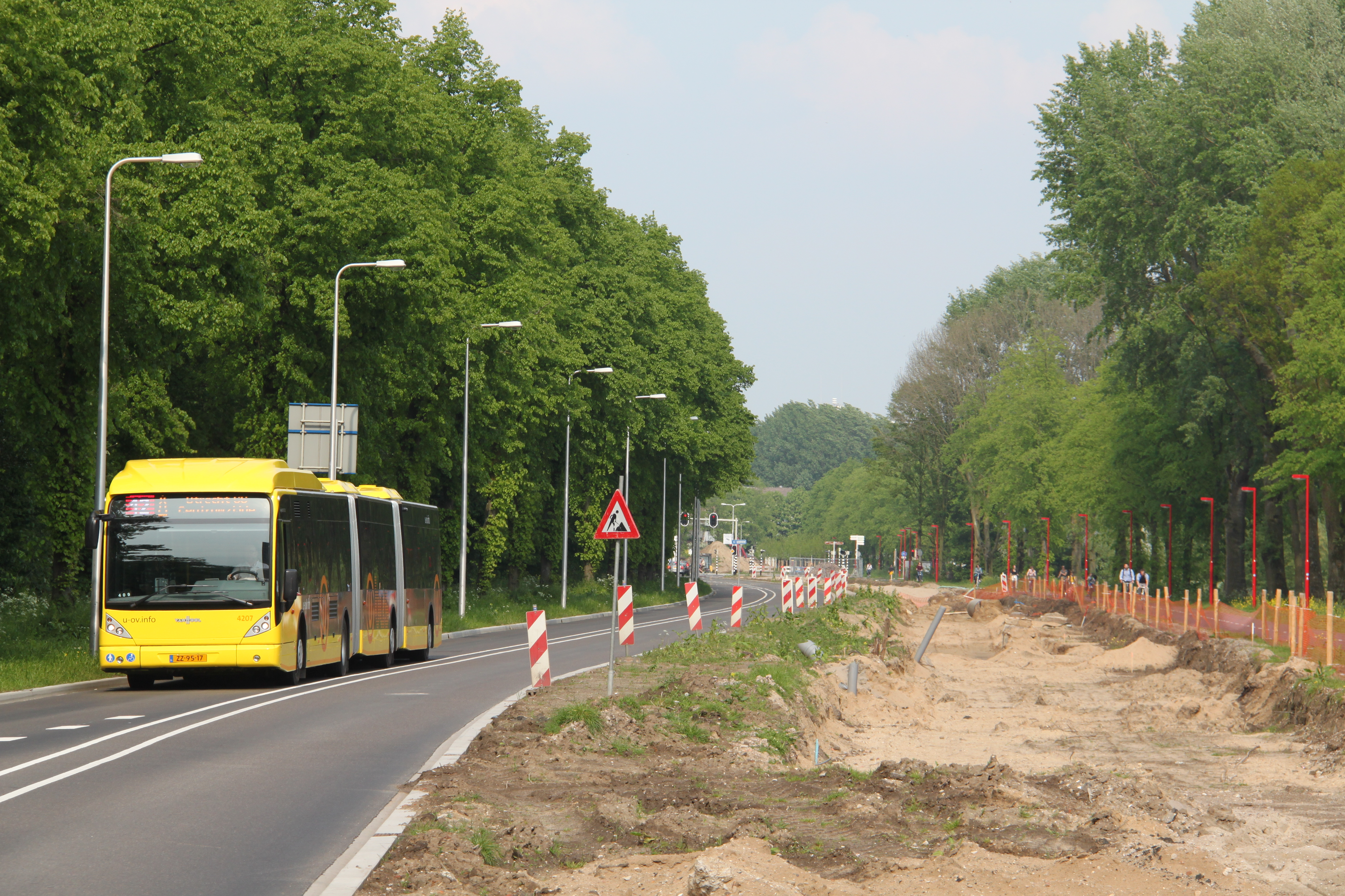 Tussen Utrecht Centraal en De Uithof wordt tot 2017 de Uithoflijn aangelegd.